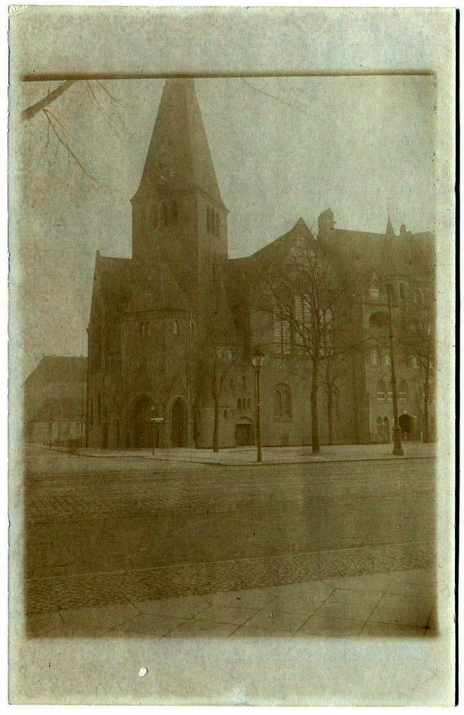 Ansichtskarte um 1920 der Adventkirche heute Danziger Straße Berlin